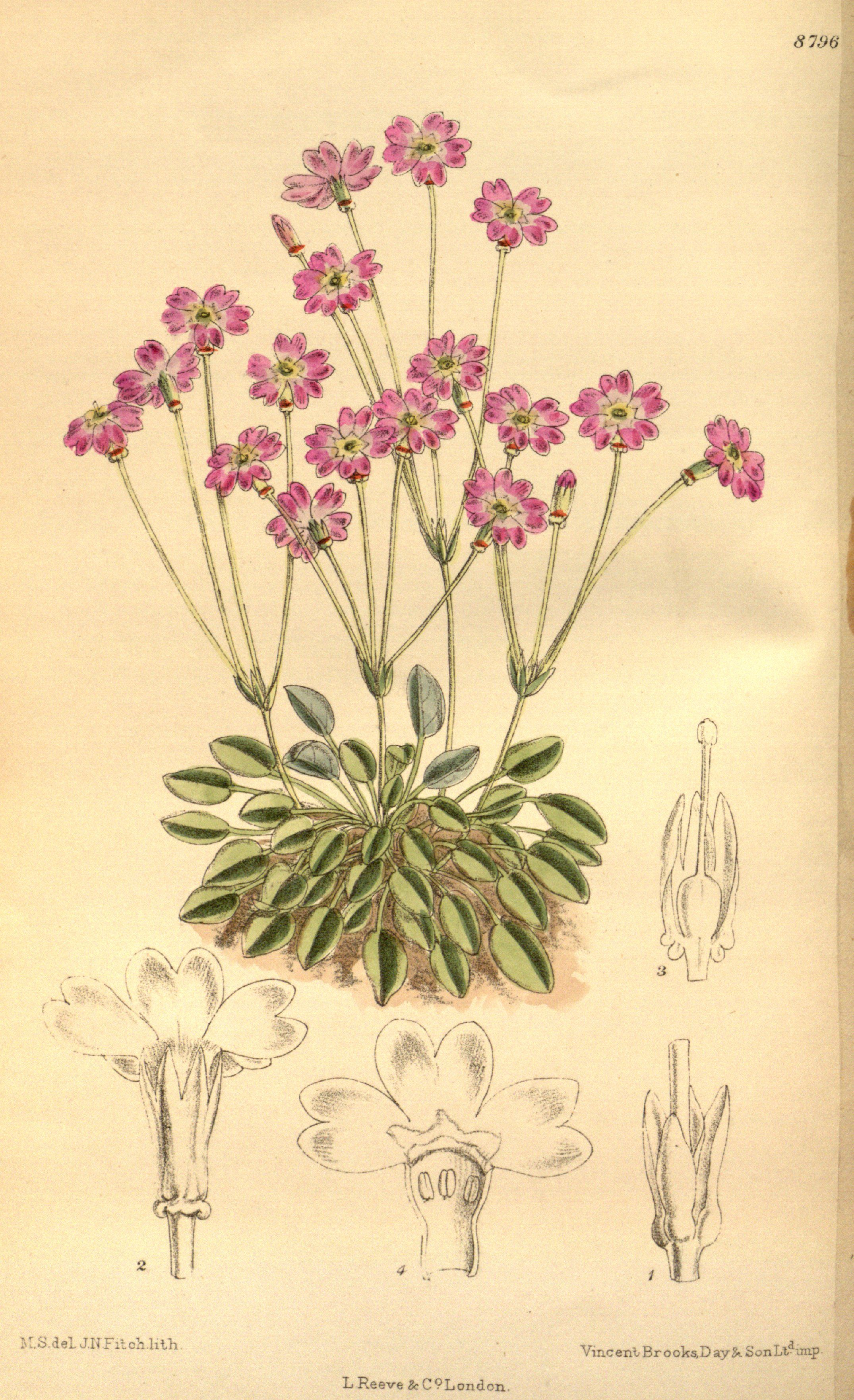 Primula tibetica, Primulaceae